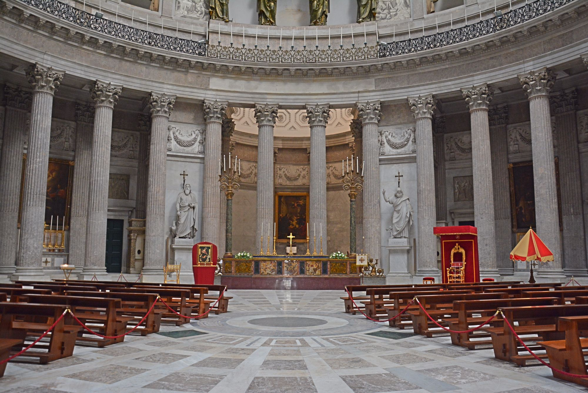 Basilica reale pontificia di San Francesco di Paola a Napoli